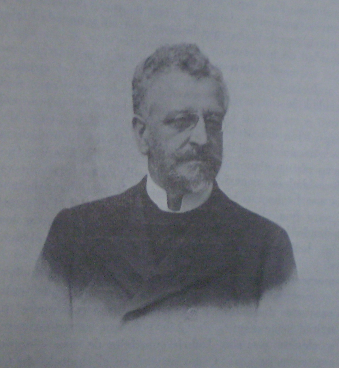 Amancio Alcorta, Ministro de Relaciones Exteriores